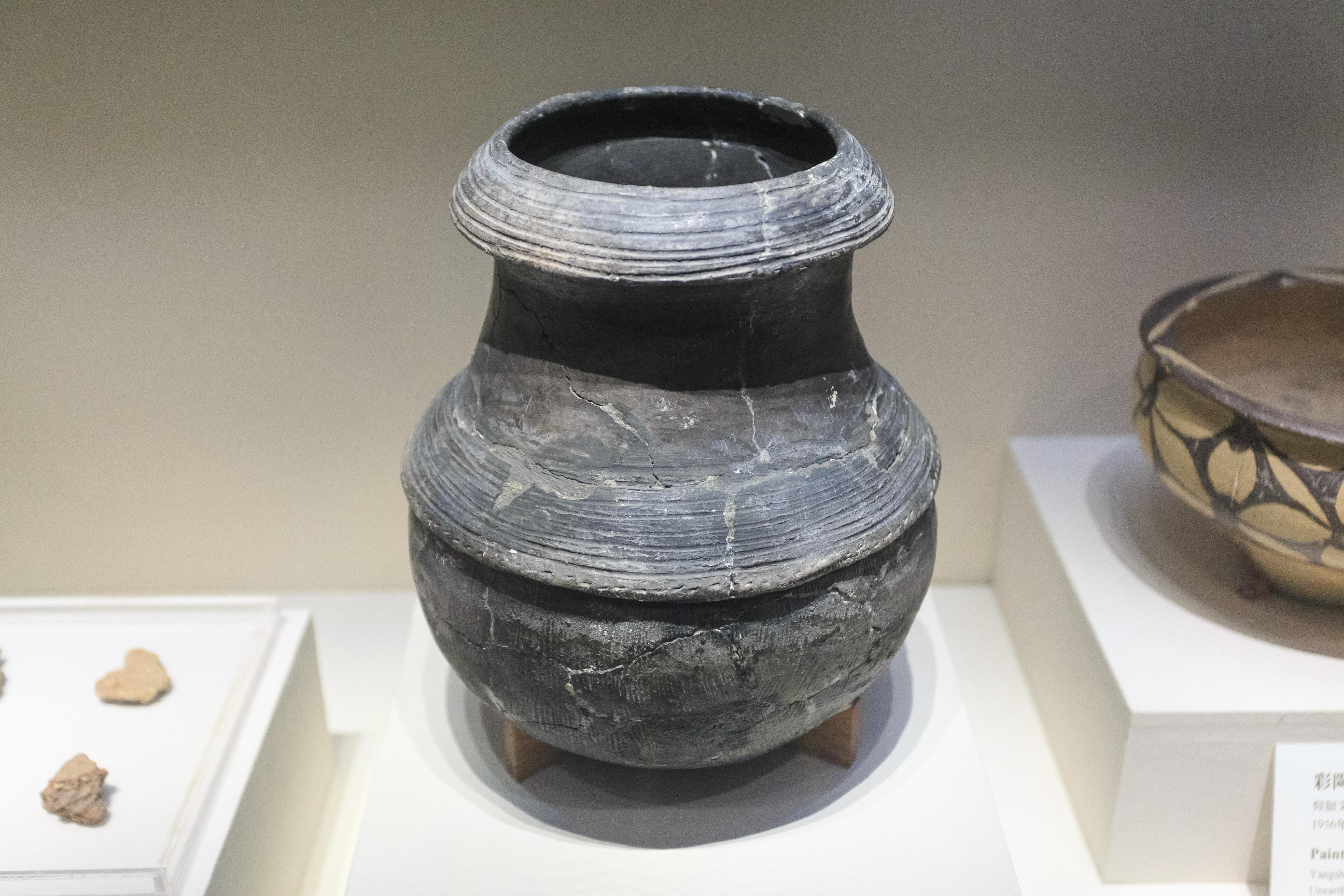 中国国家博物馆—— 陶釜，河姆渡文化（约公元前5200-前4200年），1974年浙江余姚河姆渡出土